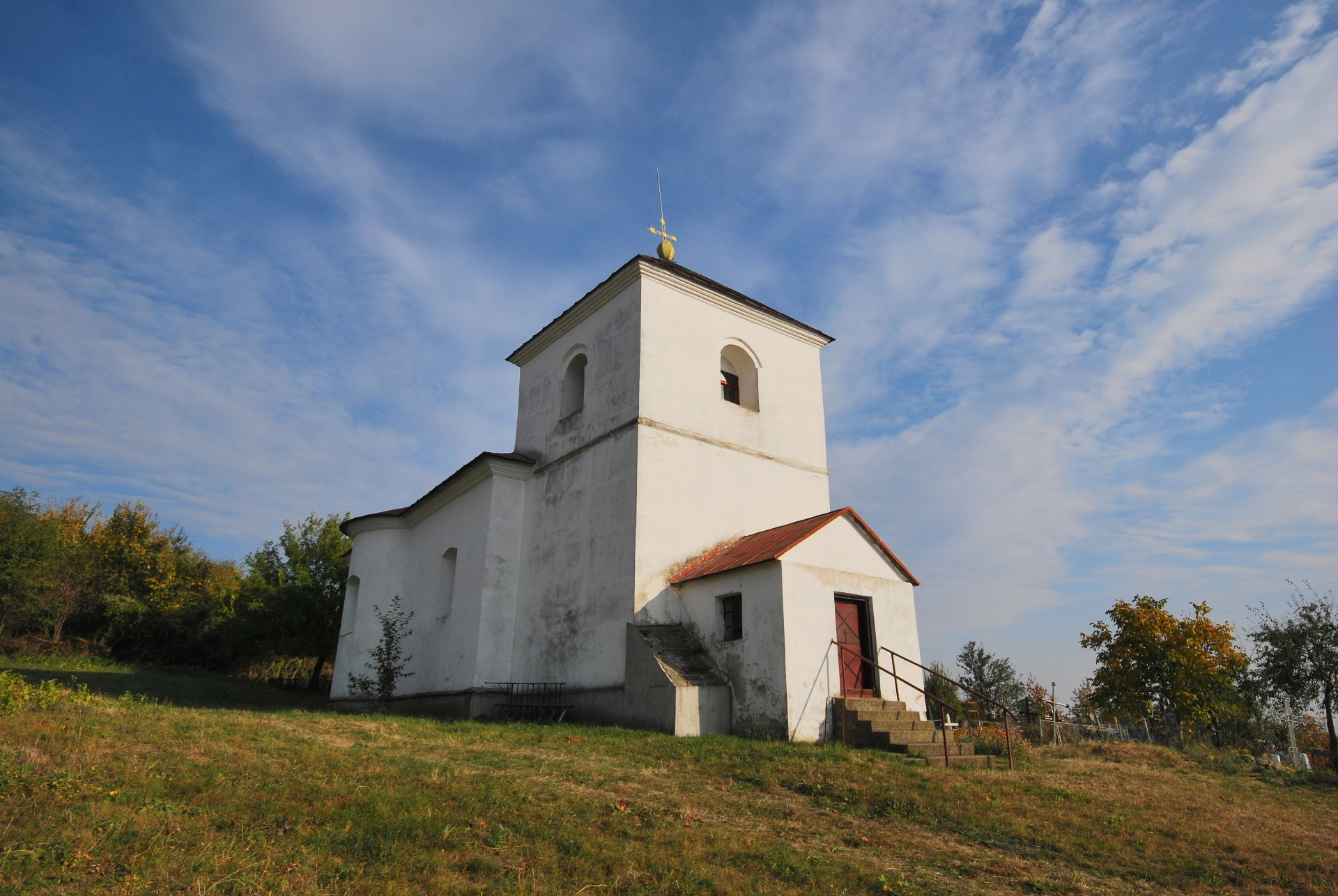 Biserica „Adormirea Maicii Domnului”